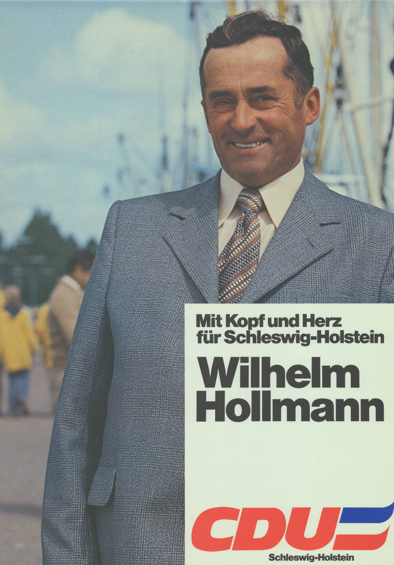 Mit Kopf und Herz für Schleswig-Holstein Wilhelm Hollmann CDU Schleswig-Holstein Abbildung: Foto Plakatart: Kandidaten-/Personenplakat mit Porträt Auftraggeber: Verantw.: CDU Schleswig-Holstein Objekt-Signatur: 10-012 : 436 Bestand: Landtagswahlplakate Schleswig-Holstein (10-012) GliederungBestand10-18: Landtagswahlplakate Schleswig-Holstein (10-012) » Landtagswahl am 29.4.1979 » Kandidatenplakate Lizenz: KAS/ACDP 10-012 : 436 CC-BY-SA 3.0 DE